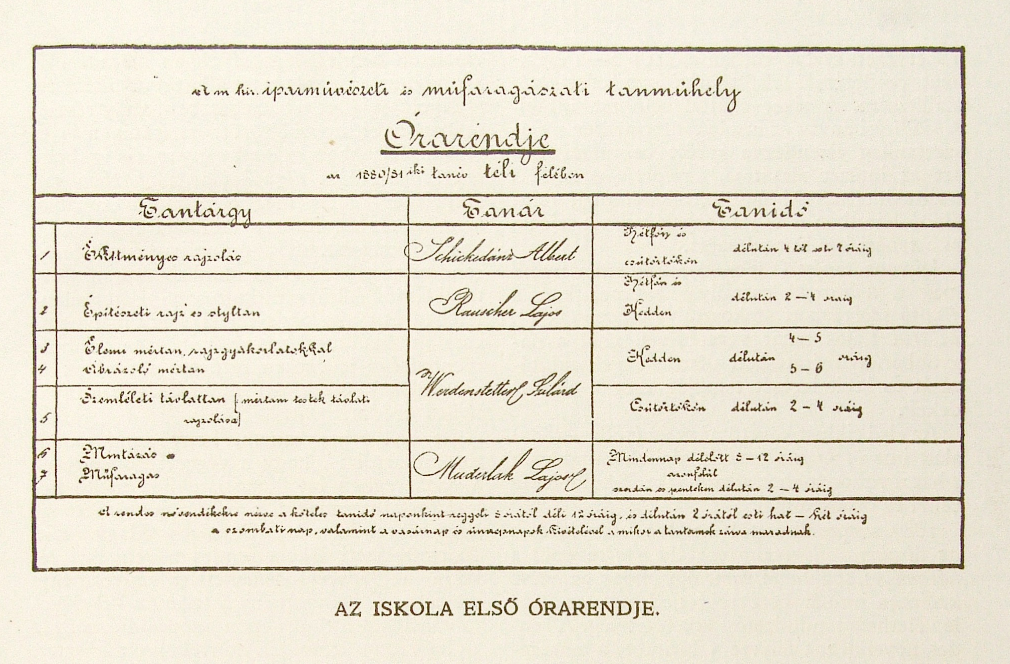 Az Országos Magyar Királyi Iparművészeti Tanoda egyetlen osztálya, a műfaragászati tanműhely 1880. november 14-én nyitotta meg kapuit, az 1870-ben alapított Országos Magyar Királyi Mintarajztanoda és Rajztanárképezde – a mai Képzőművészeti Egyetem jogelődje – szervezeti egységeként. Az intézmény ekkor az Andrássy úton, a (régi) Zeneakadémia épületében kapott helyet. Az 1880-90-es években sorra indultak az Iparművészeti Iskola újabb és újabb „szakosztályai”: mintázás, ötvösség, fametszés, díszítő festés, rézmetszés, kisplasztika, díszítő szobrászat. A képzési idő az 1887/88-as tanévtől háromról öt évre emelkedett, a szakképzést ugyanis kétéves előkészítő tanfolyam alapozta meg.